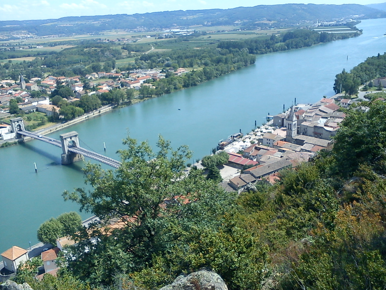 Andance vue générale et détails